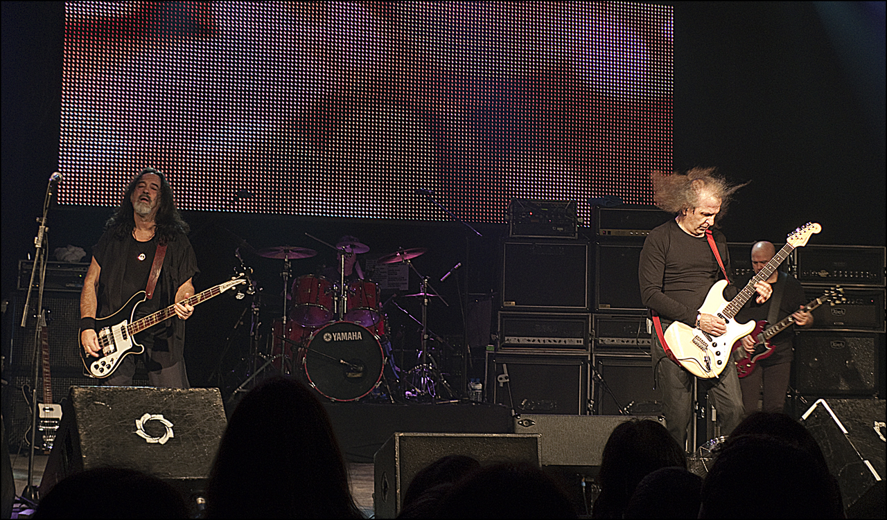 Concierto de reunión de Barón Rojo en Madrid.